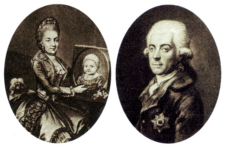 Die Eltern der Königin Luise: Friederike von Mecklenburg-Strelitz und Karl Ludwig von Mecklenburg-Strelitz.